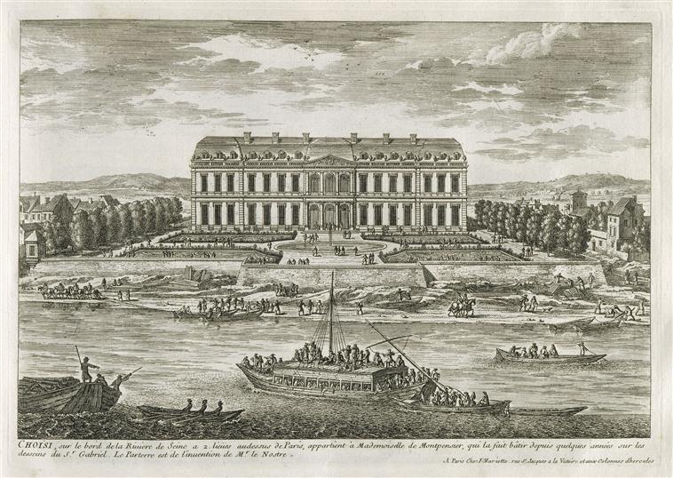 Sujet : Le château de Choisy au temps de la Grande Mademoiselle